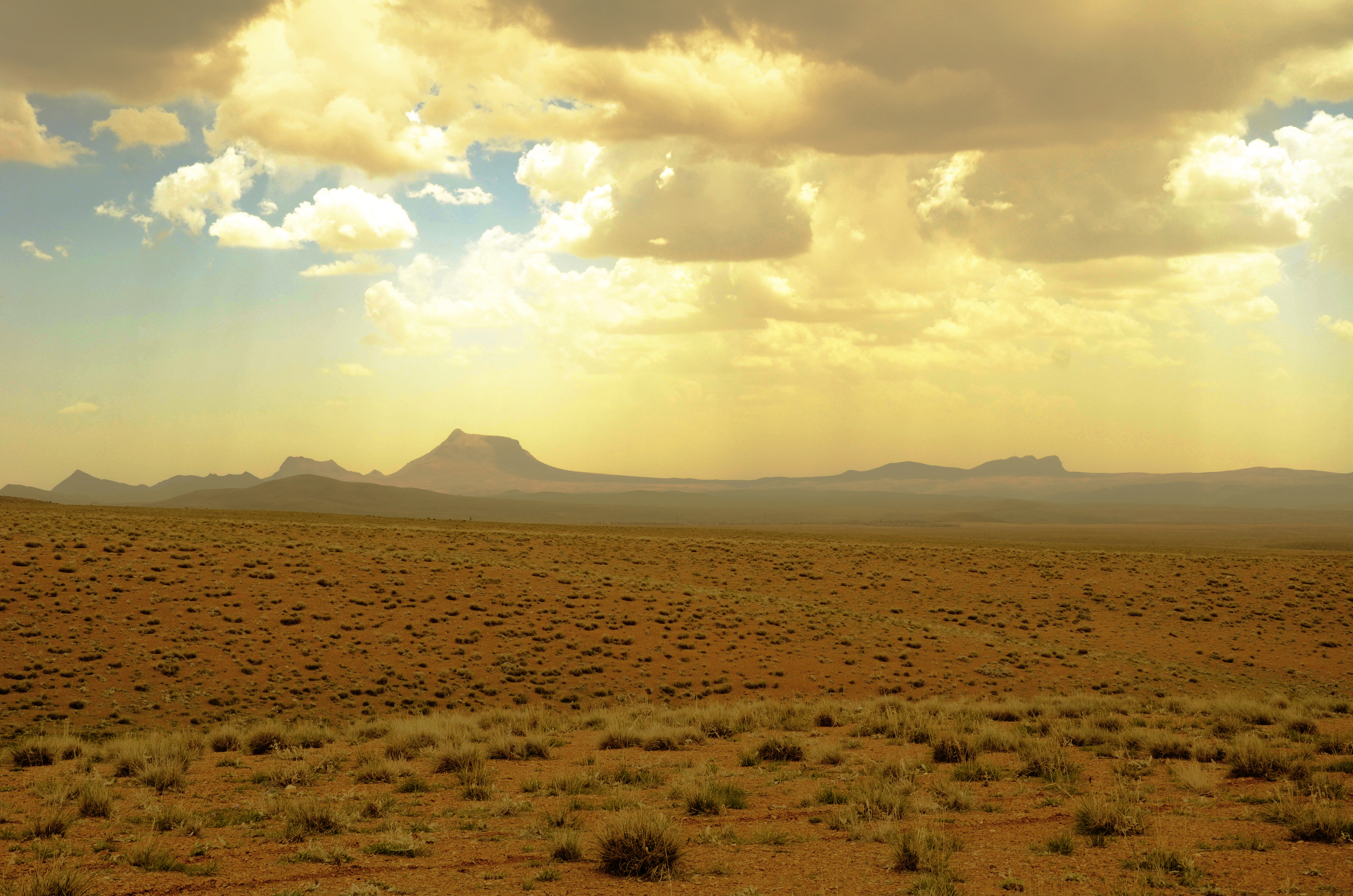 Iran - Isfahan - Chadegan Road